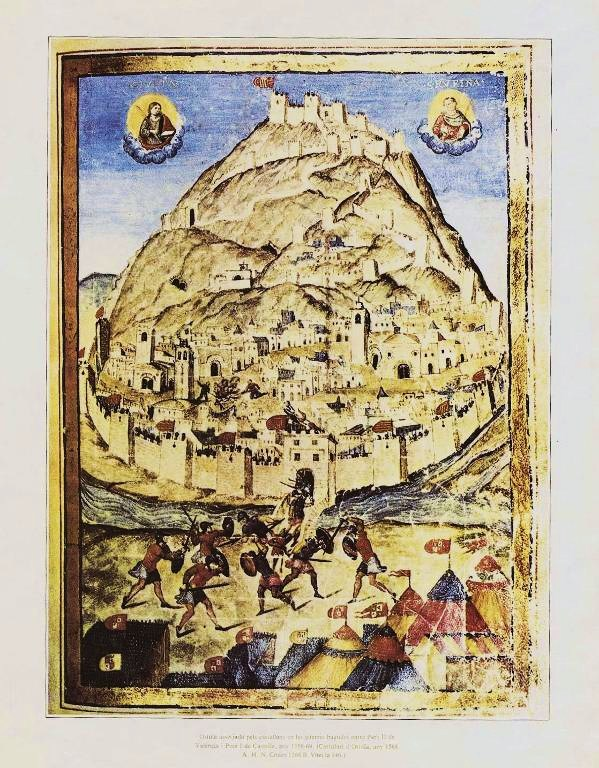 La ciutat d'Oriola en un manuscrit de 1568.